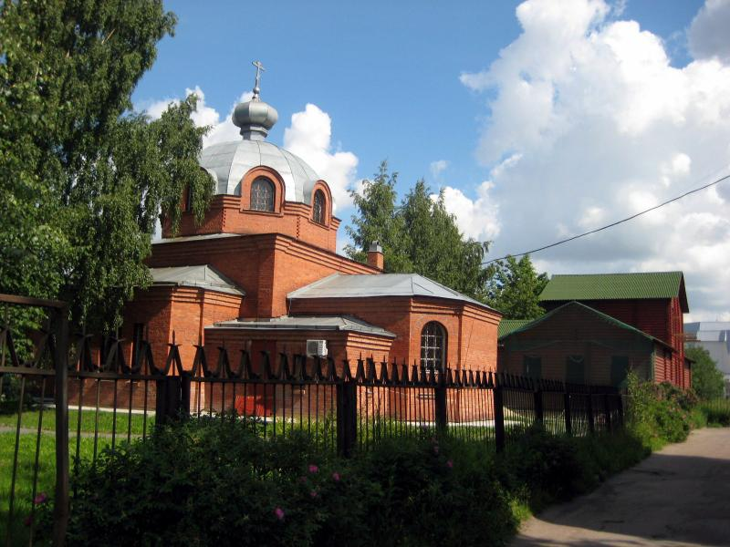 Церковь